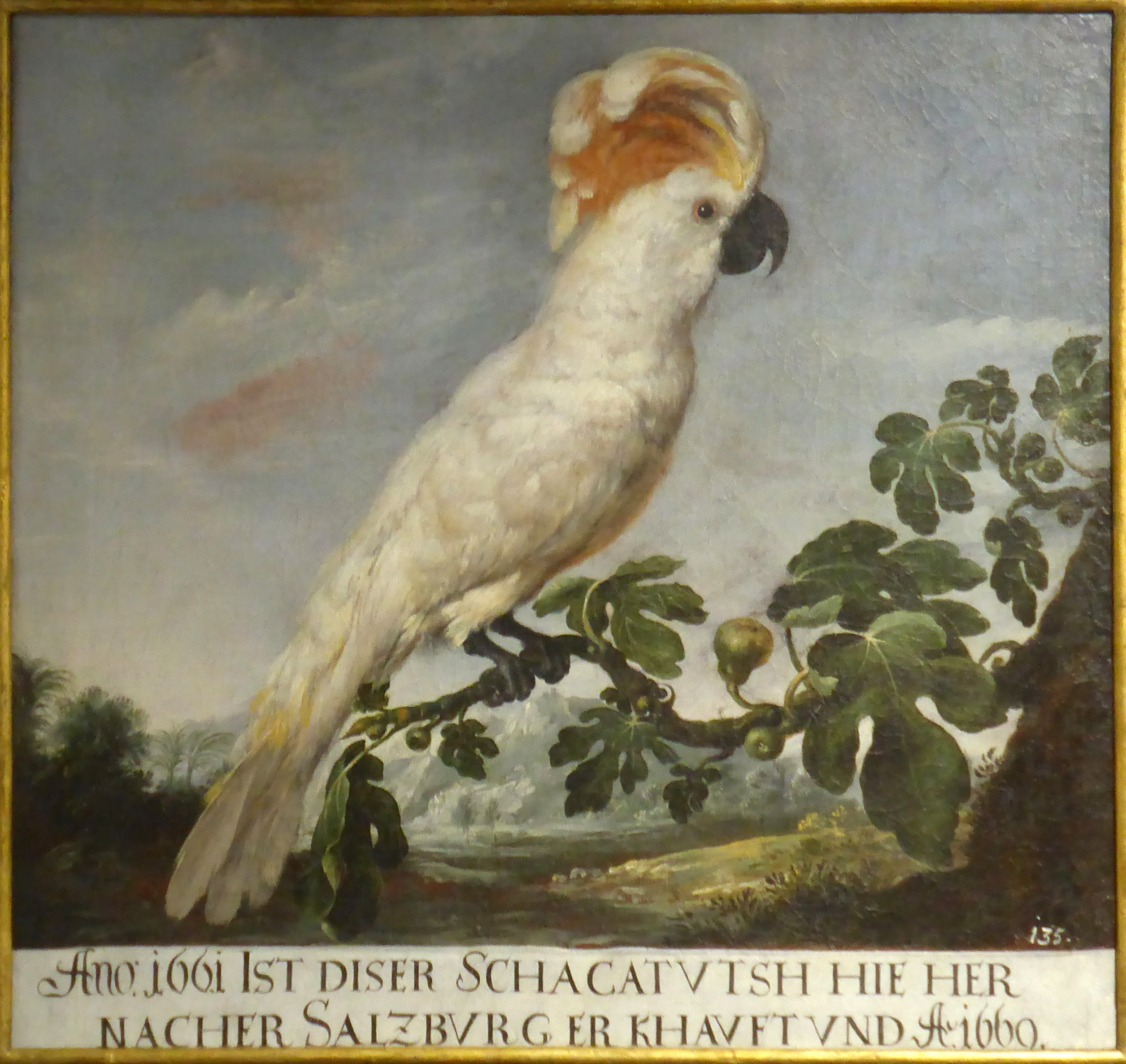 Dieser Molukkenkakadu lebte seit 1661 auf Schloss Hellbrunn.